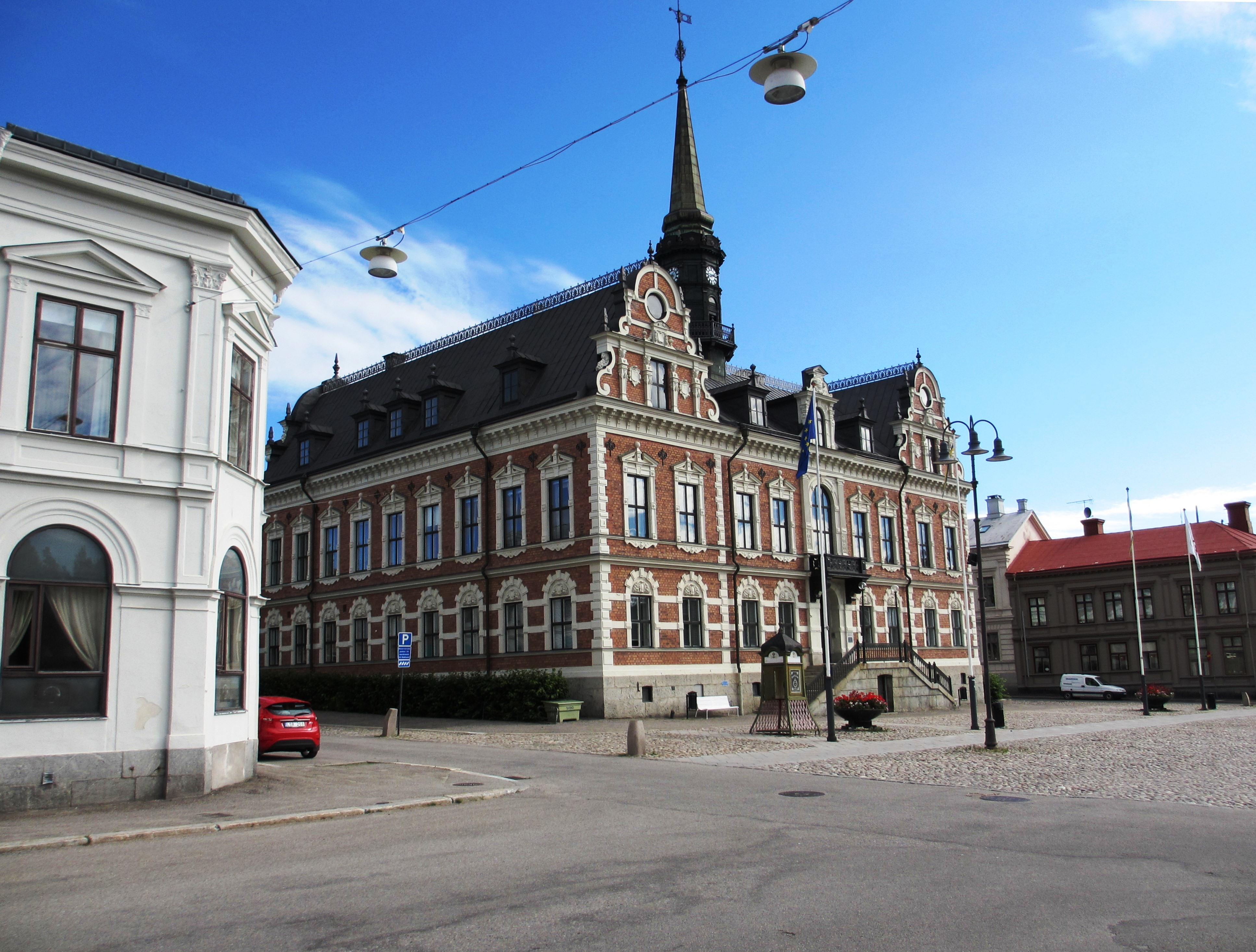 Rådhuset i Söderhamn